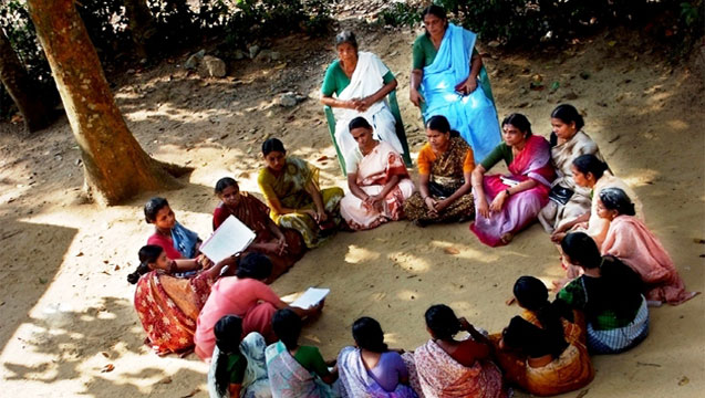 കുടുംബശ്രീ അയല്‍ക്കൂട്ടം